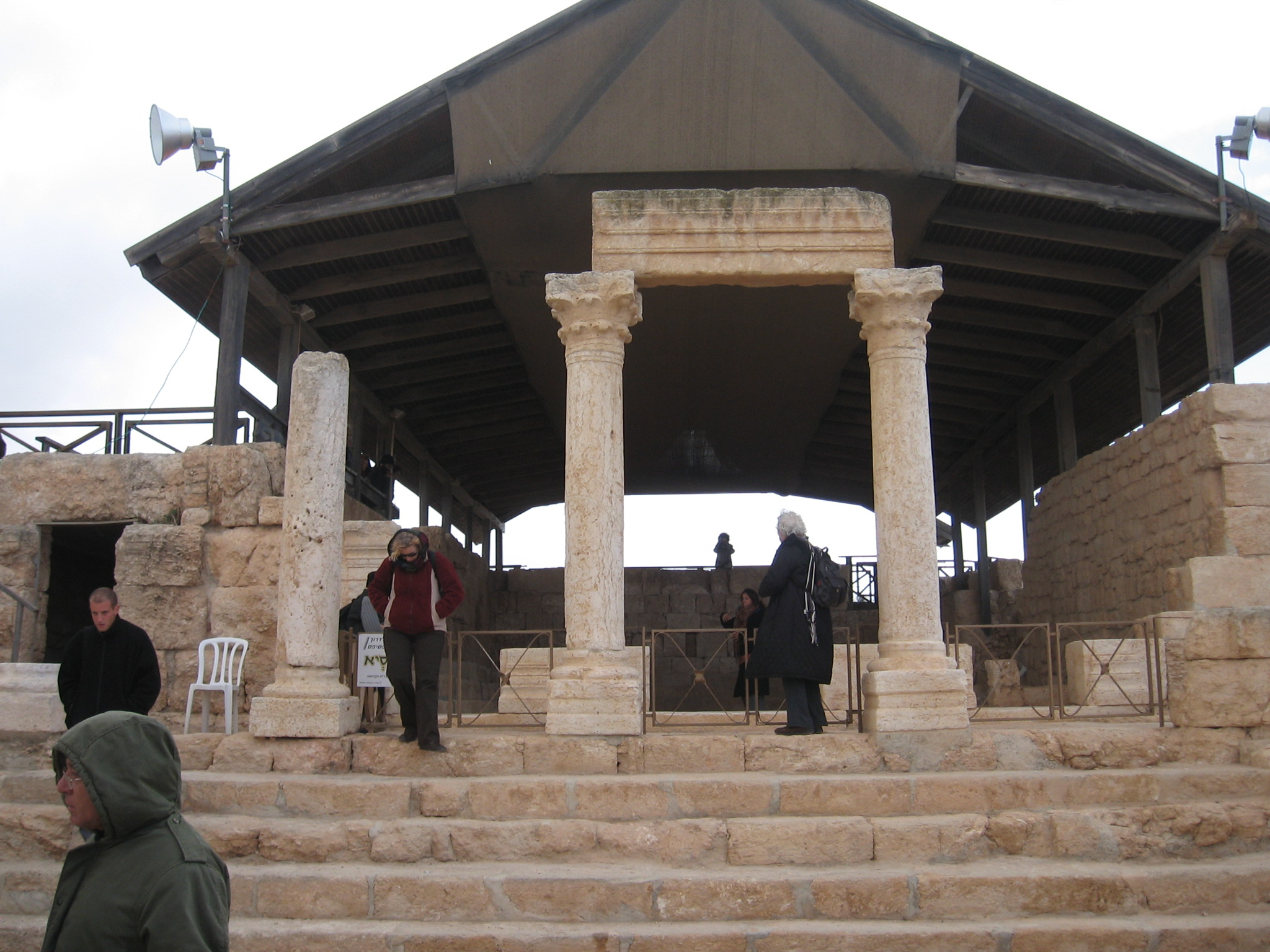 Susya. Inside Synagogoes